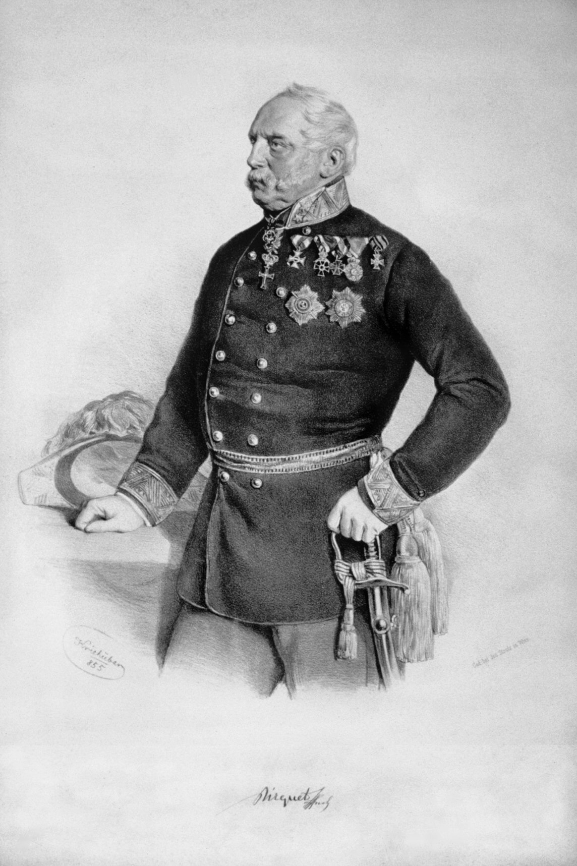 Peter von Pirquet (1781-1861), Freiherr von Cesenatico, Feldteugmeister, Ritter des Maria-Theresien-Orden, Kapitän der Arcierenleibgarde. Lithographie von Josef Kriehuber, 1855